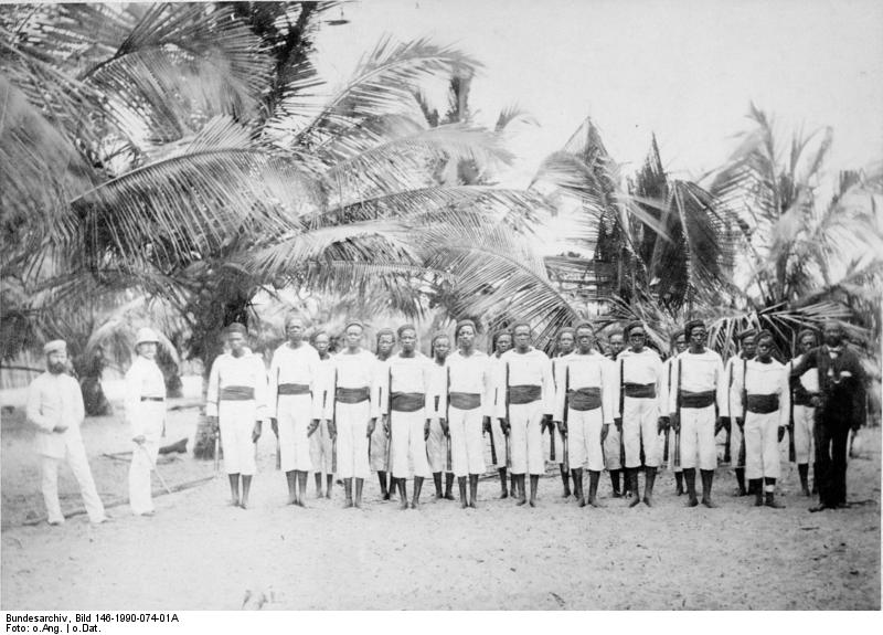 Hanssah - Schutztruppen